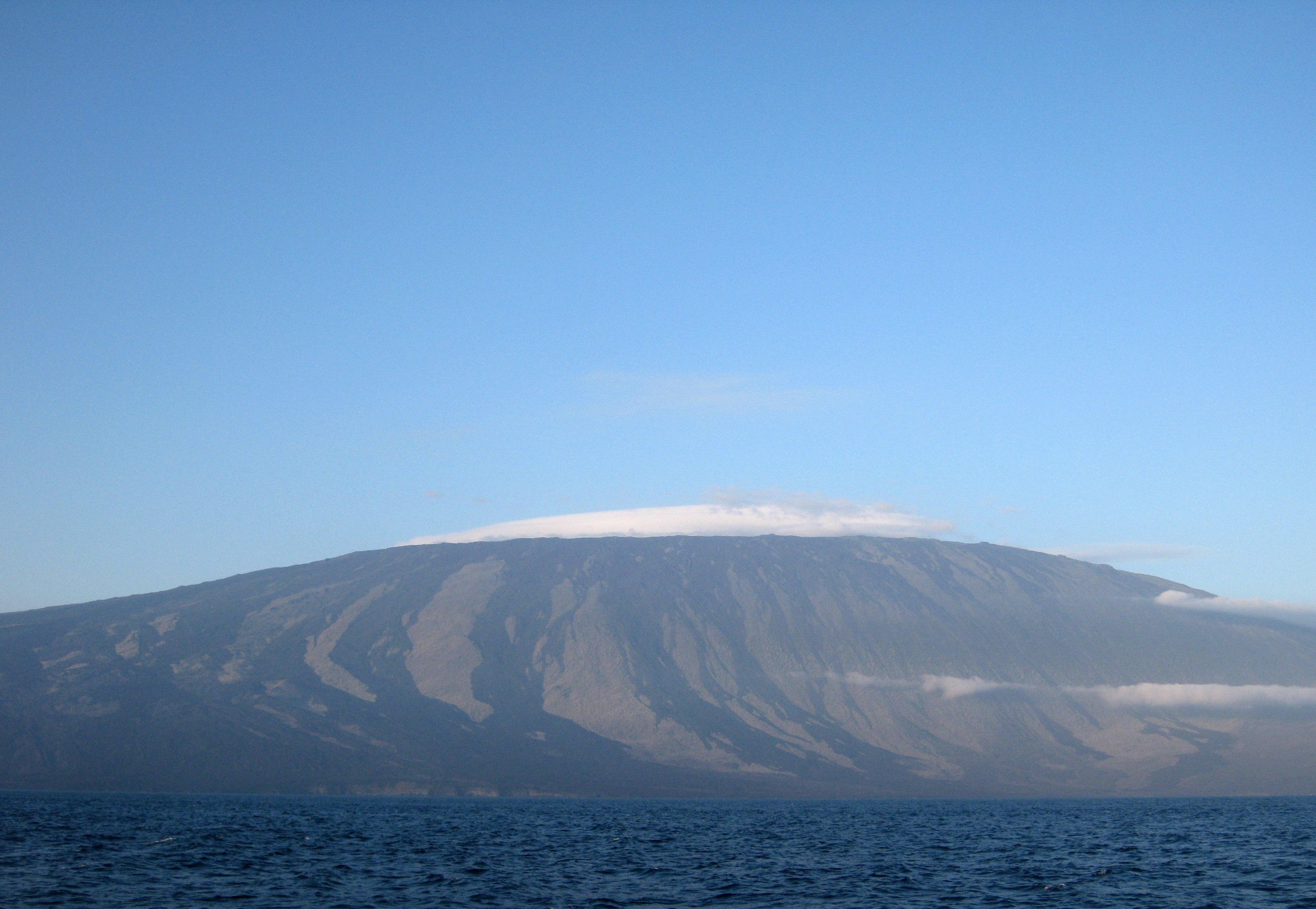 Wolf Volcano, Isabela Island, Galapagos